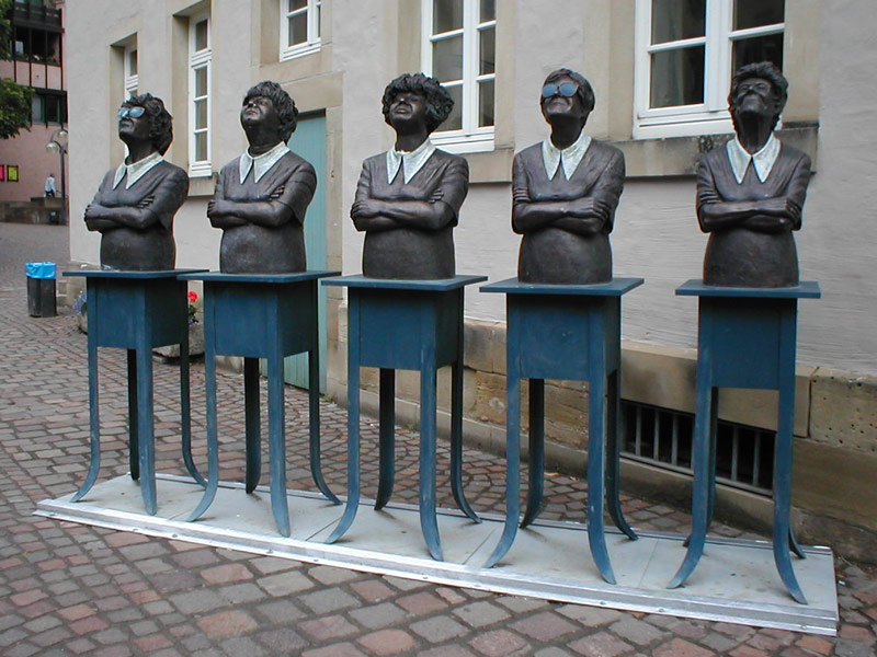 Figurengruppe vor dem Rathaus in Güglingen mit dem Titel "Einigkeit macht stark - Persil bleibt Persil " von Guido Messer